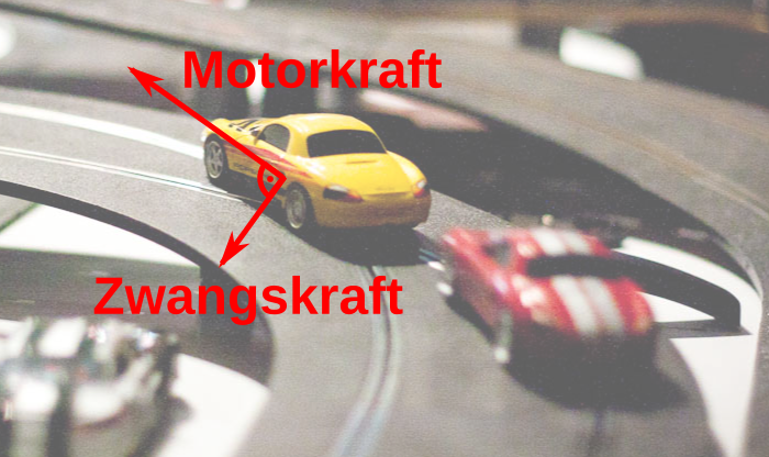 Zwangskräfte bei einer Autorennbahn. Abgeleitetes Werk von: At the Build Brighton Hackspace launch party.